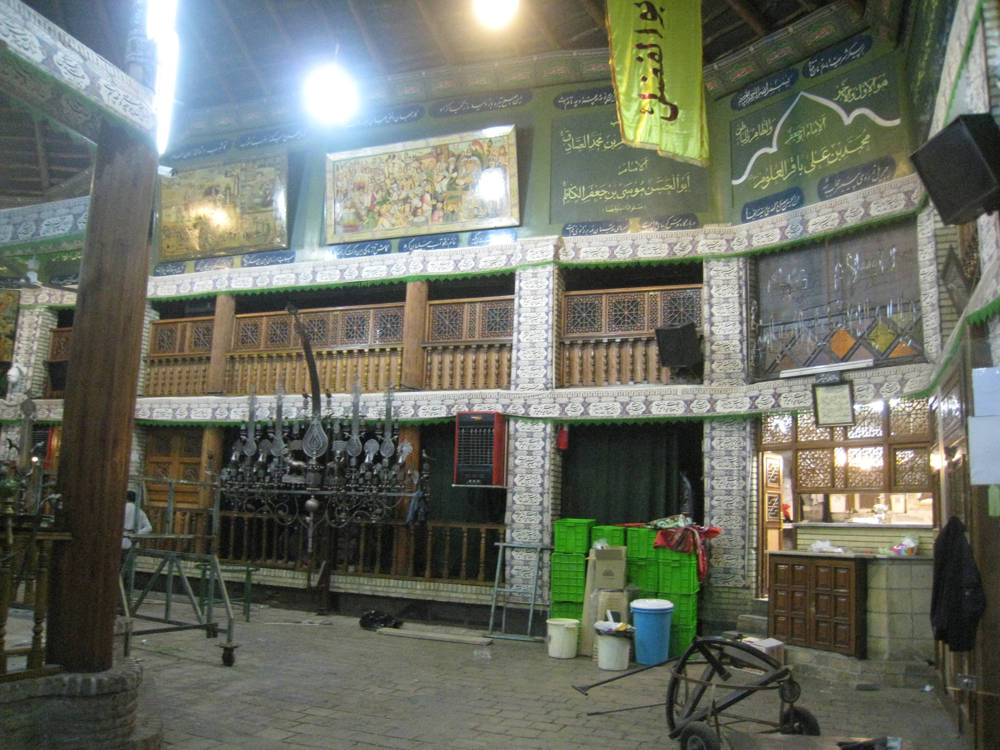 تکیه نیاوران